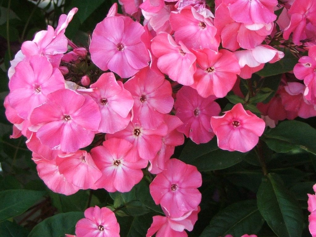 Phlox paniculata (Floks wiechowaty)